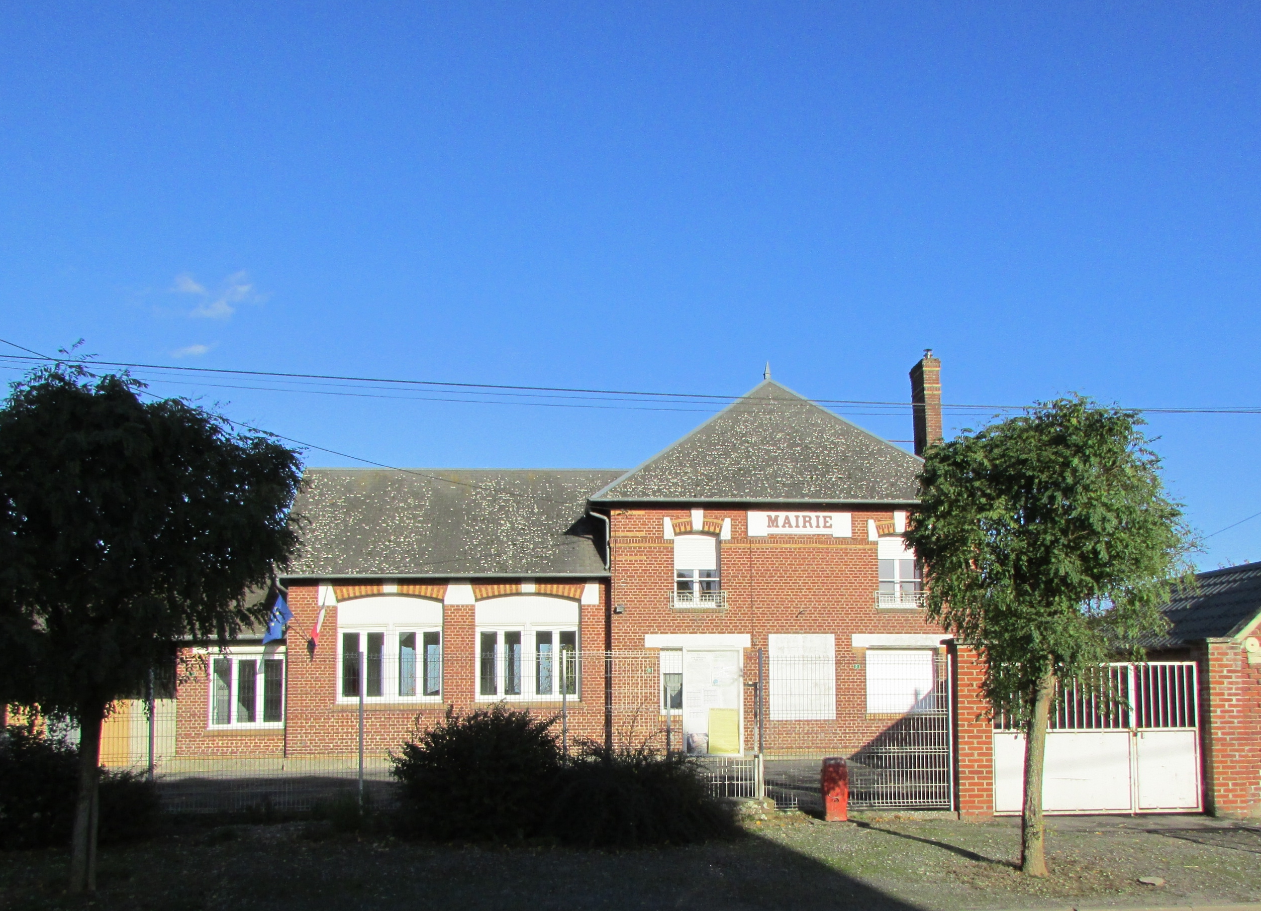 La mairie de Hancourt.